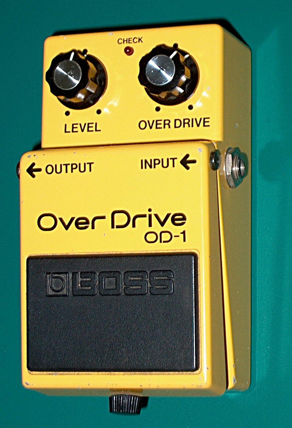 Gitarreneffektgerät Boss OD-1 Verzerrer, ca. 1980